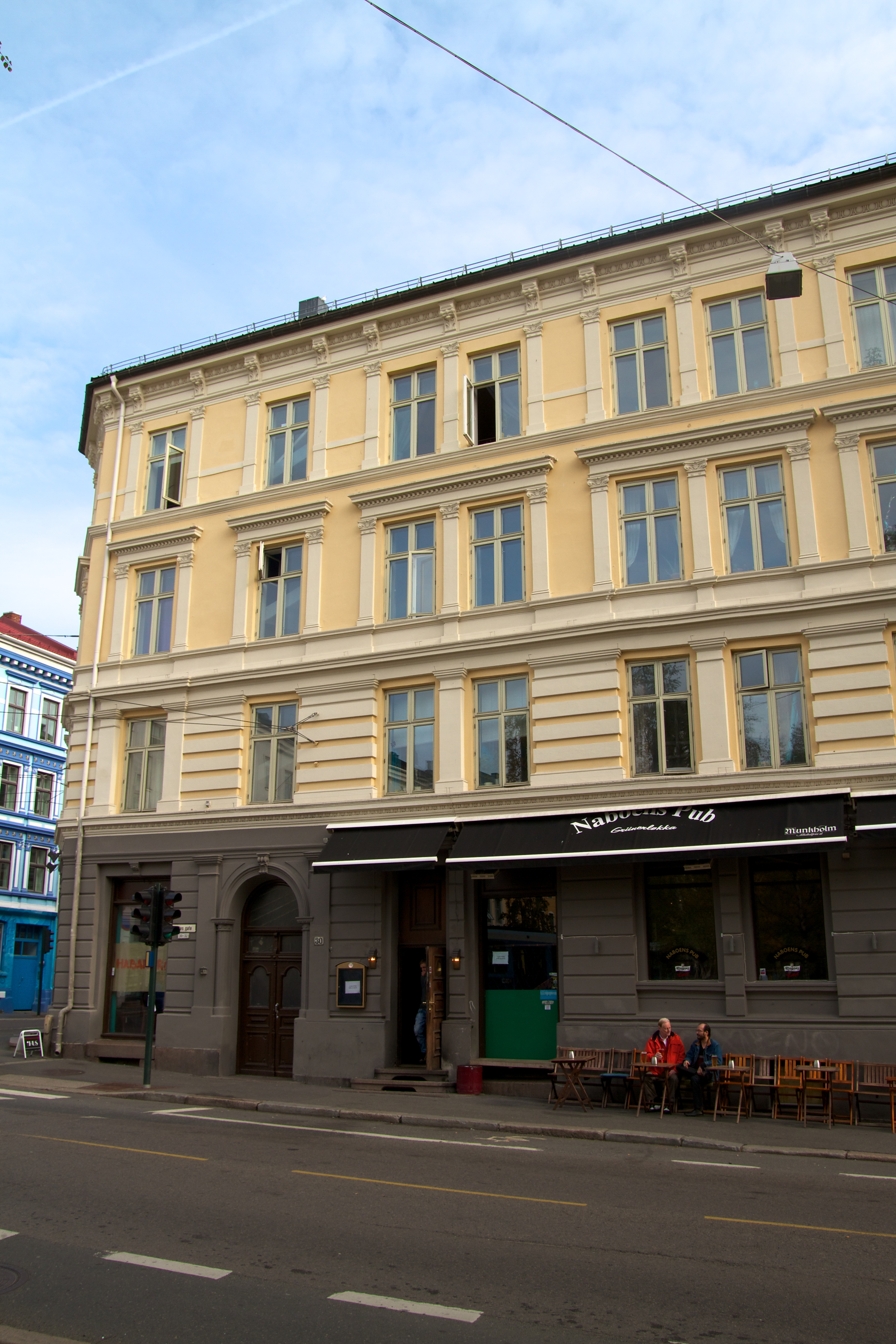 Toftes gate 30 i Oslo.